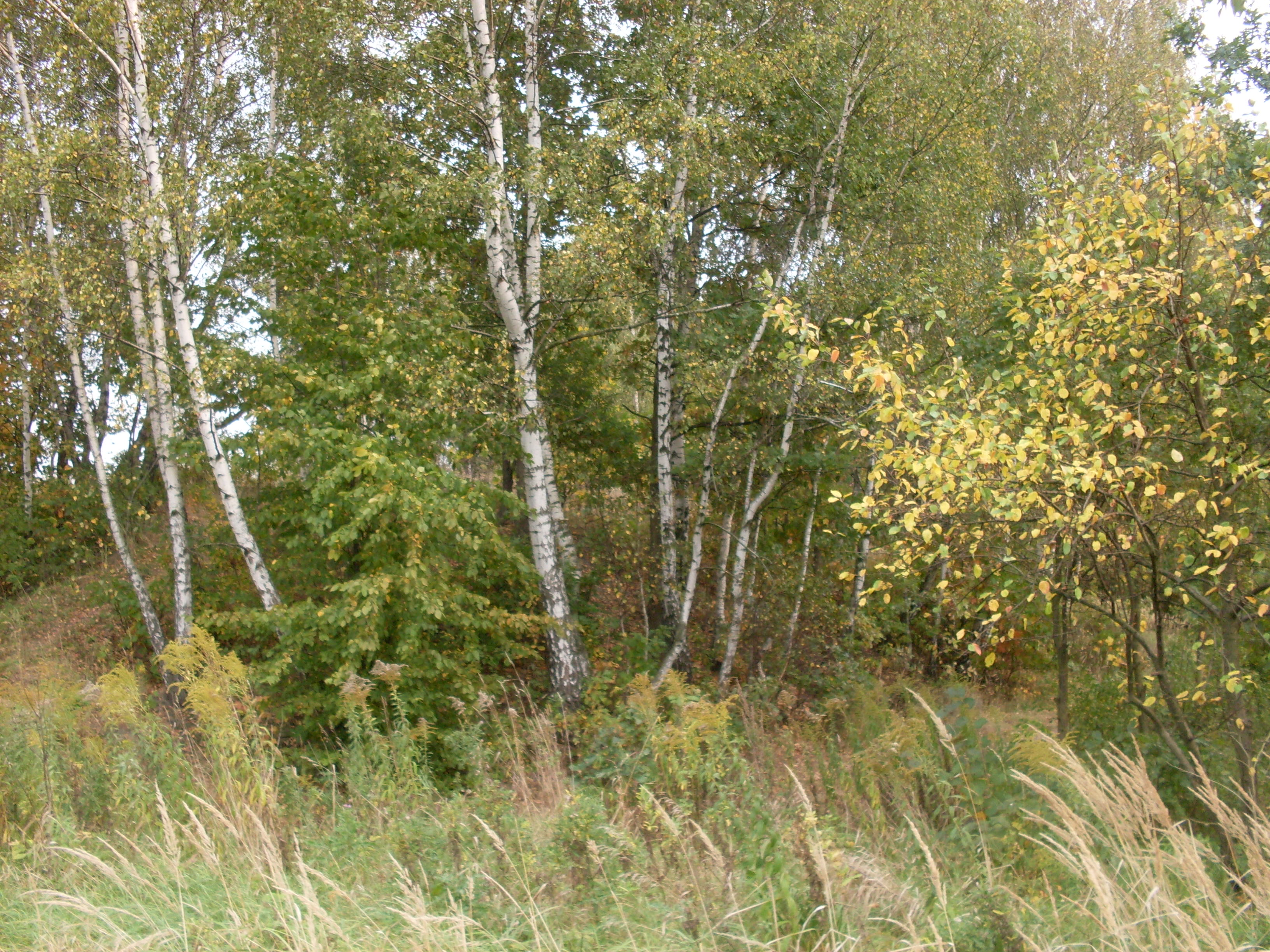 Tenczynek. Były szyb górniczy Barbara